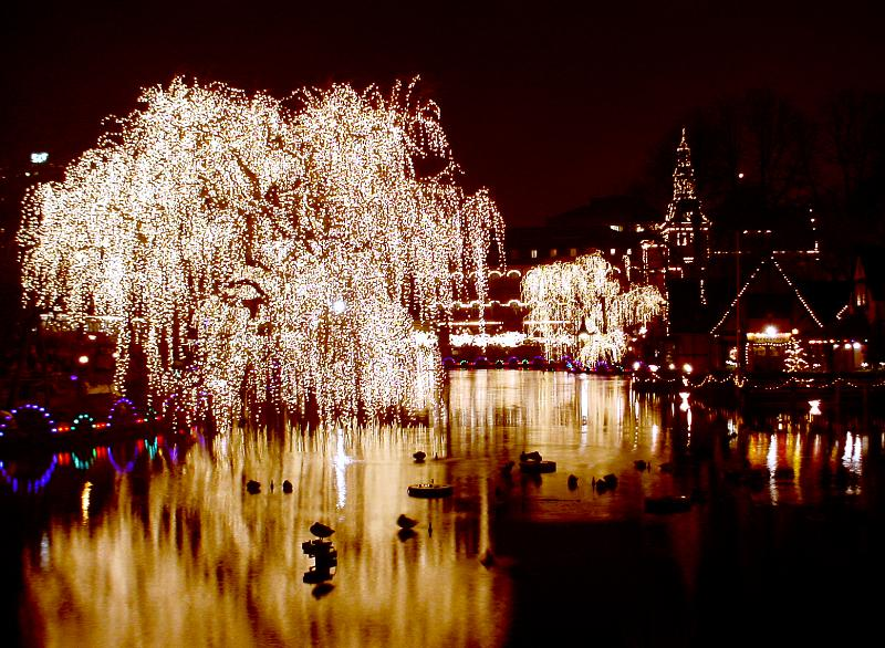 Tivoli Gardens at night